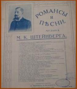 задняя страница нот издательства К.Леопас (С-Петербург, Невский пр., 80), середина 1910-х годов страничка с перечислением вышедших в издательстве нот композитора и "поэта" Михаила Карловича Штейнберга, (1867-??), автора более сотни популярных и знаменитых жестоких романсов